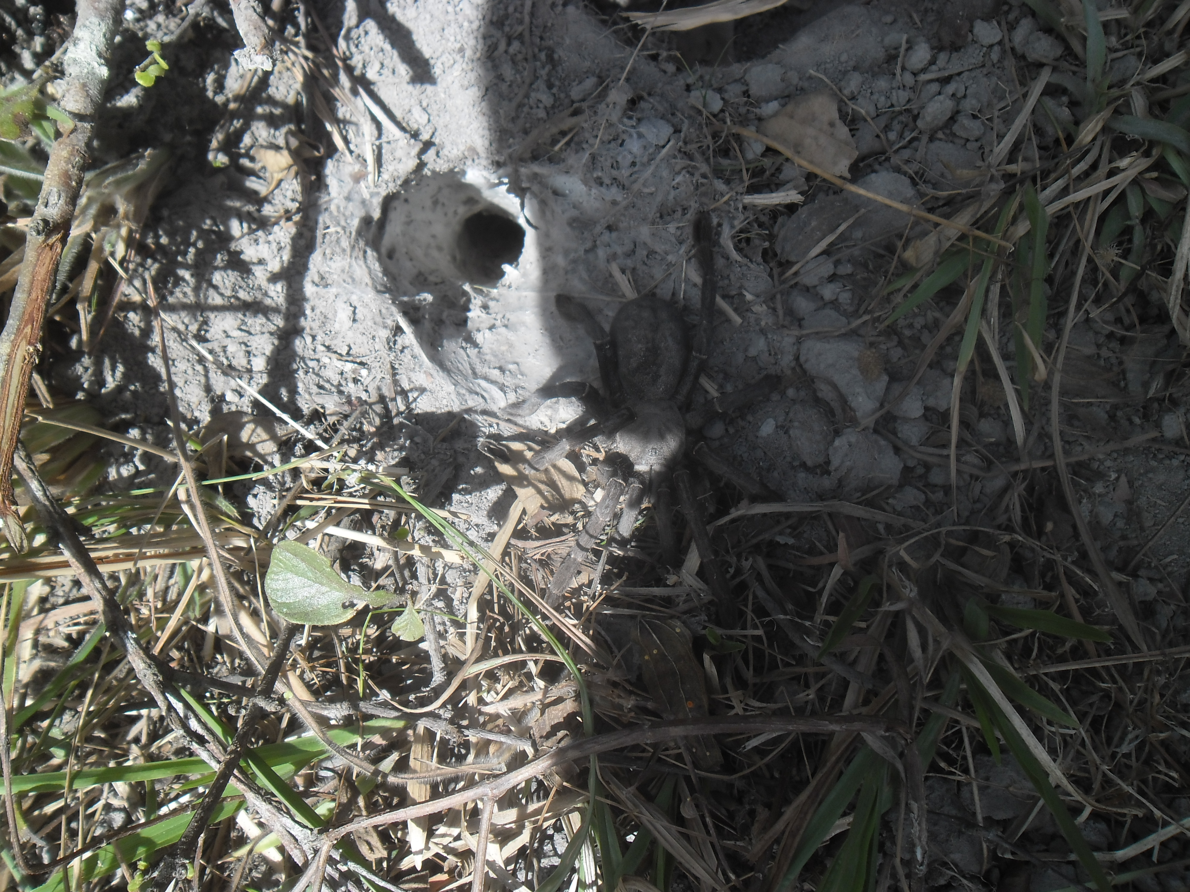 tarantula u prašumi u provinciji Ratanakiri, Kambodža